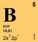 Бор (элемент)